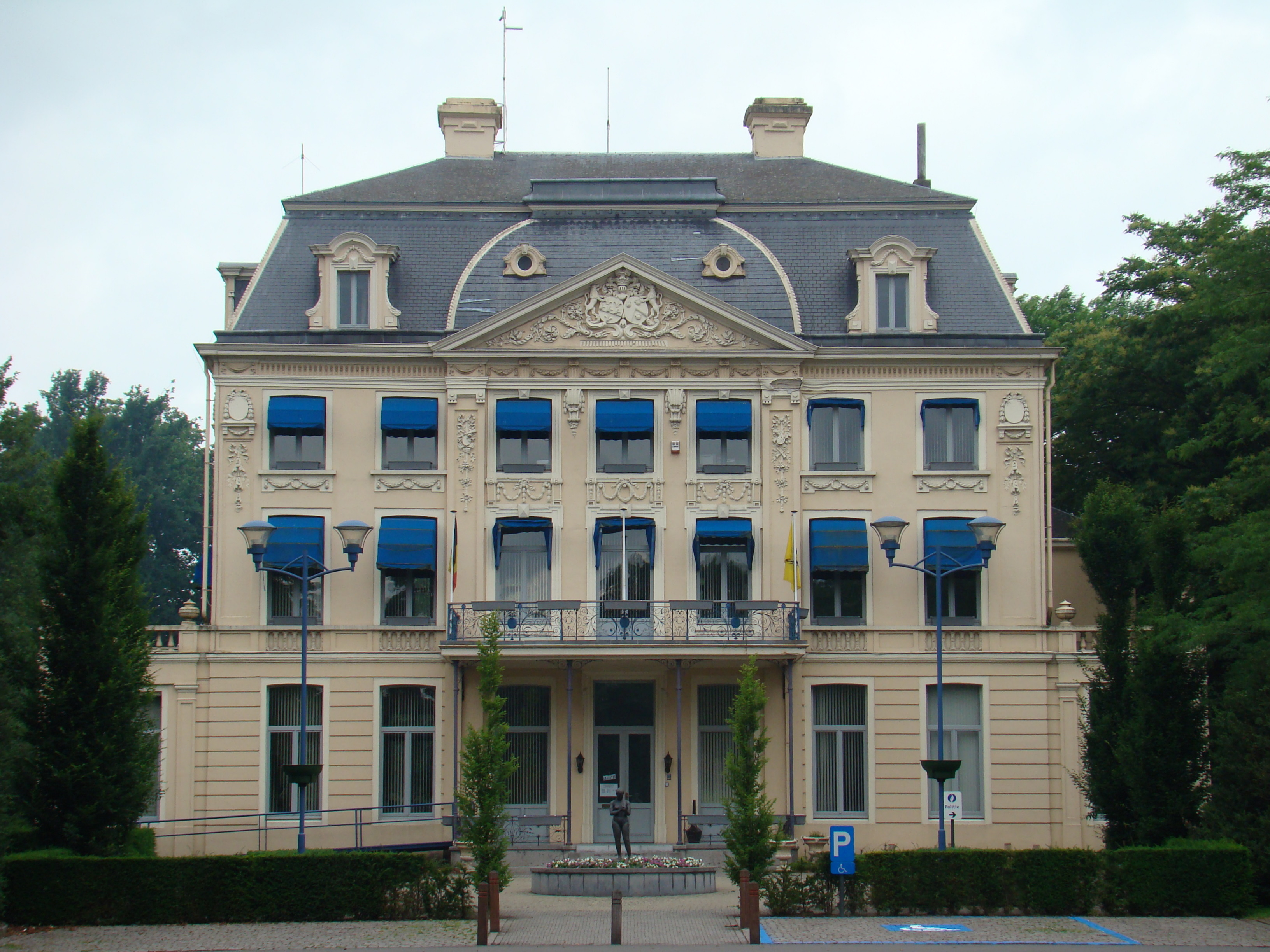 Wielsbeke kasteel Hernieuwenburg Ingang dreef Castle Hernieuwenburg, Entrance, Wielsbeke, West Flanders, Belgium